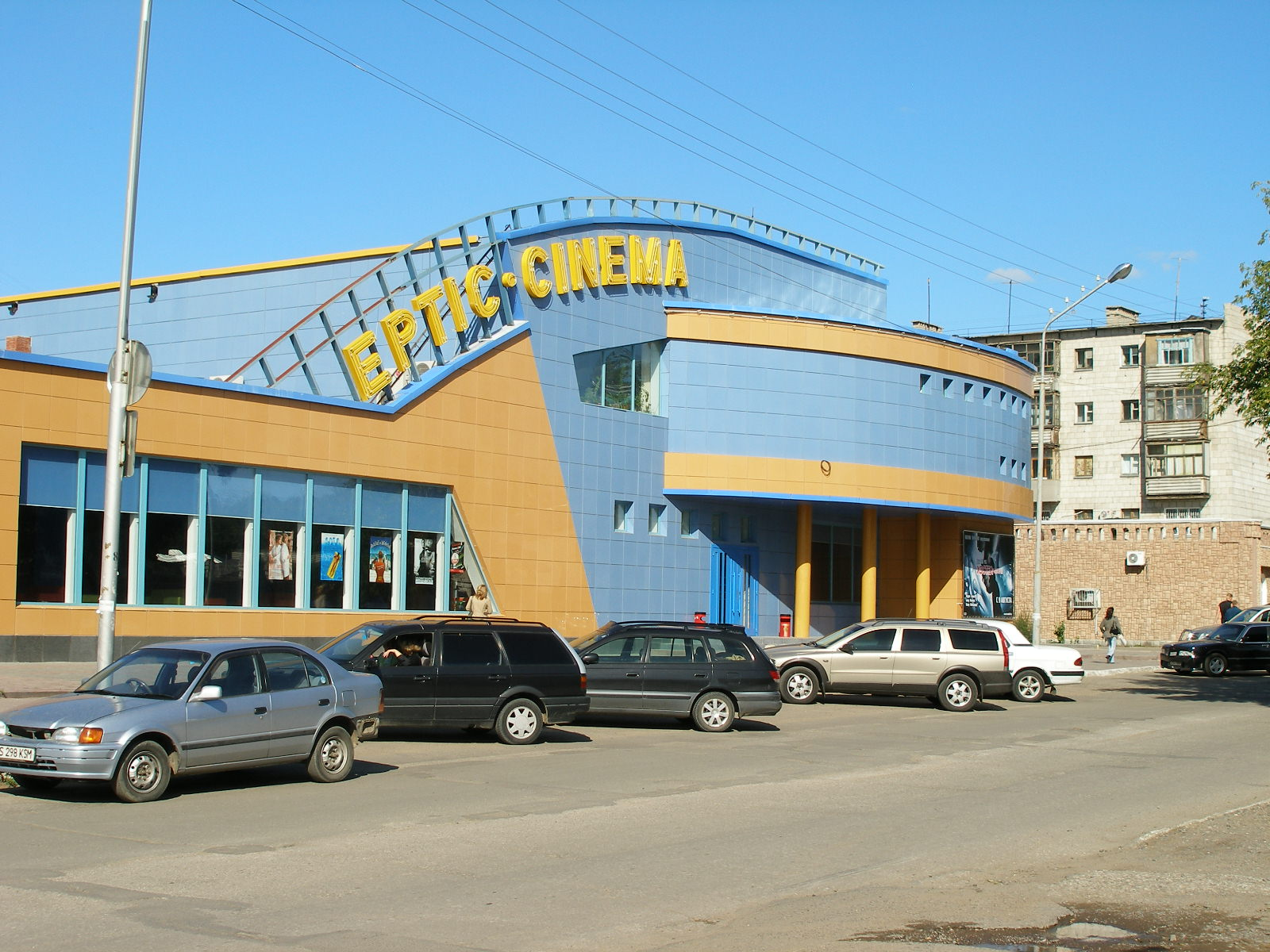 Здание кинотеатра «Иртыш», г. Павлодар, Казахстан